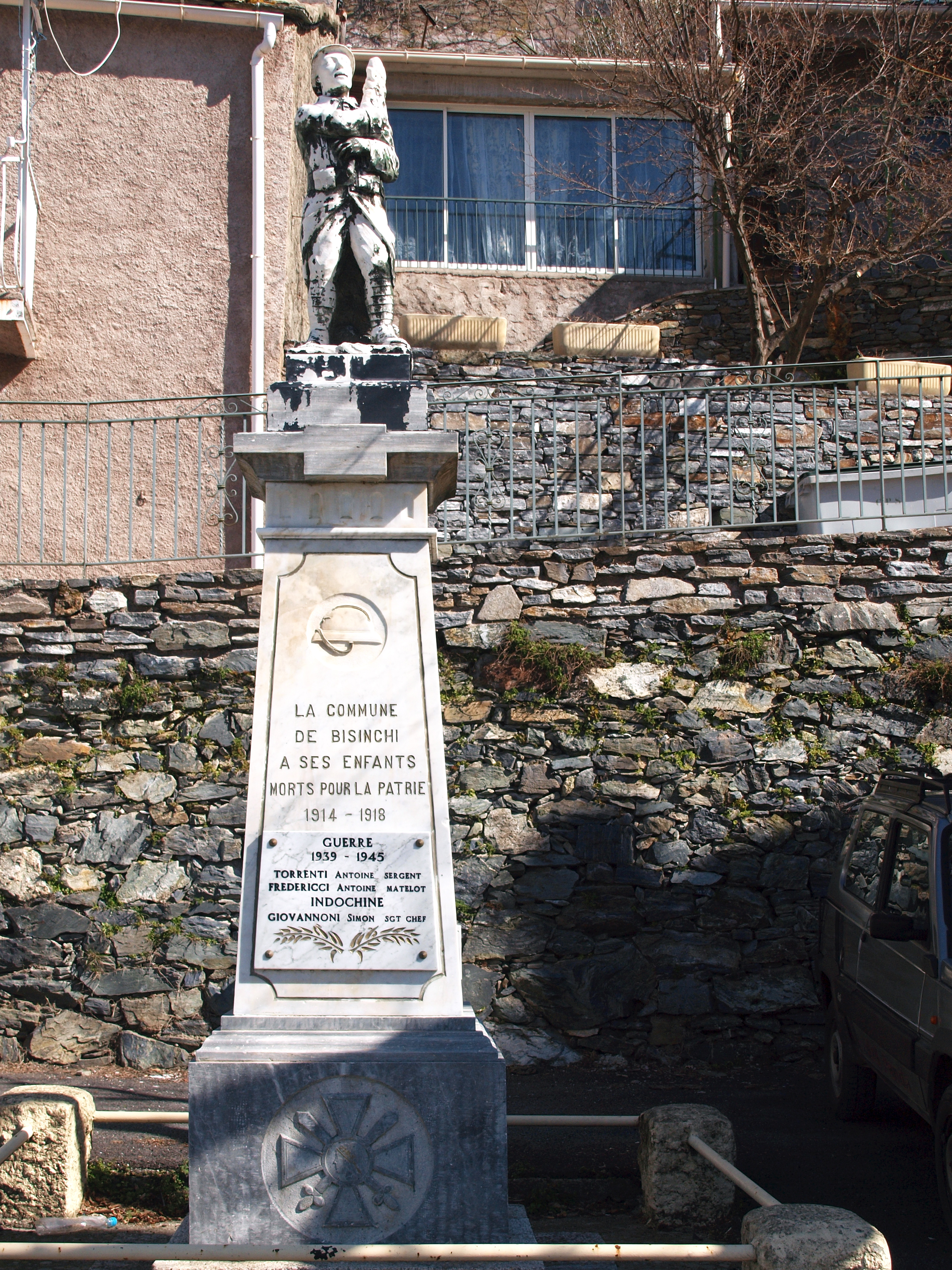 Bisinchi, Rustinu (Corse) - Monument aux morts de Bisinchi Corsu: Bisinchi, Rustinu (Corsica) - Munumentu di i Morti